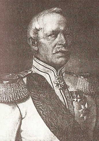 Friedrich Wilhelm I. von Hessen (1802-1875)